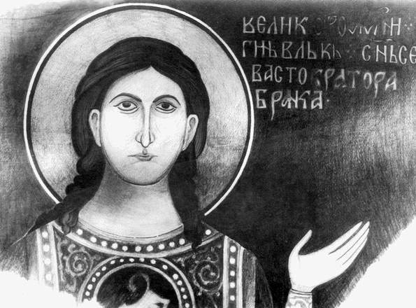 Српски (ћирилица): Једини сачуван портрет Вука Бранковића, са фреске у охридској цркви Богородице Перивлепте. Вук се налази одмах до последњег српског цара Уроша. Стар је око 18 година, стасит, крупних очију и дуге риђе косе, са светачким ореолом око главе.